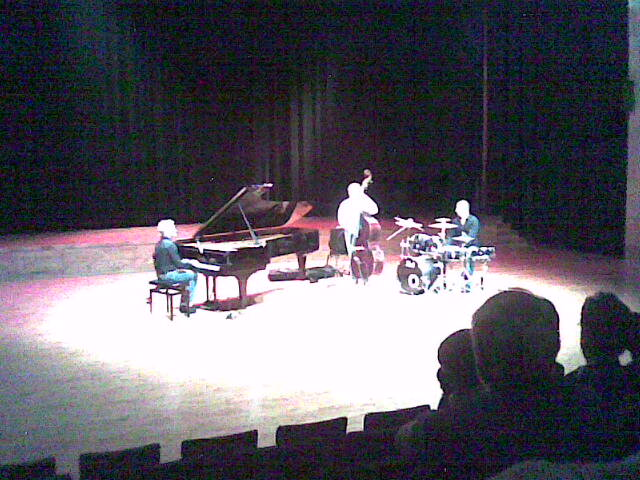 Lenni-Kalle Taipale Trio